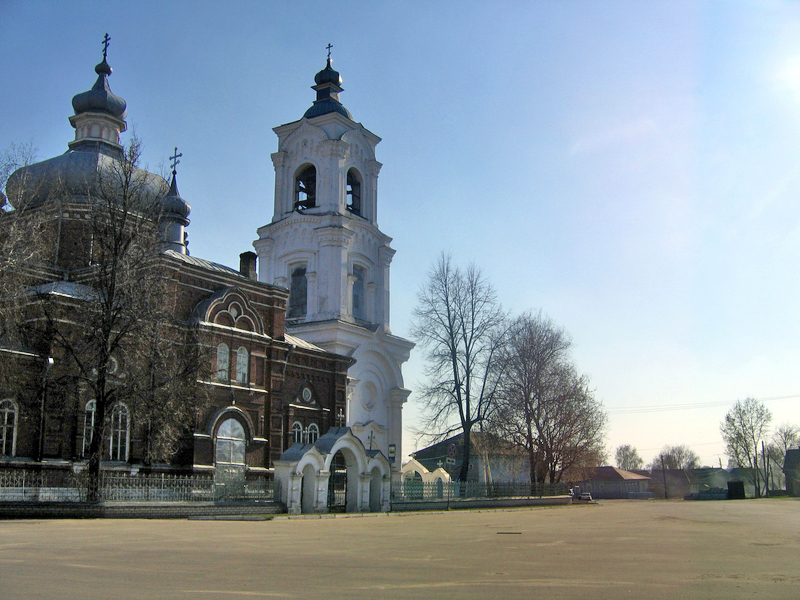 Кадом